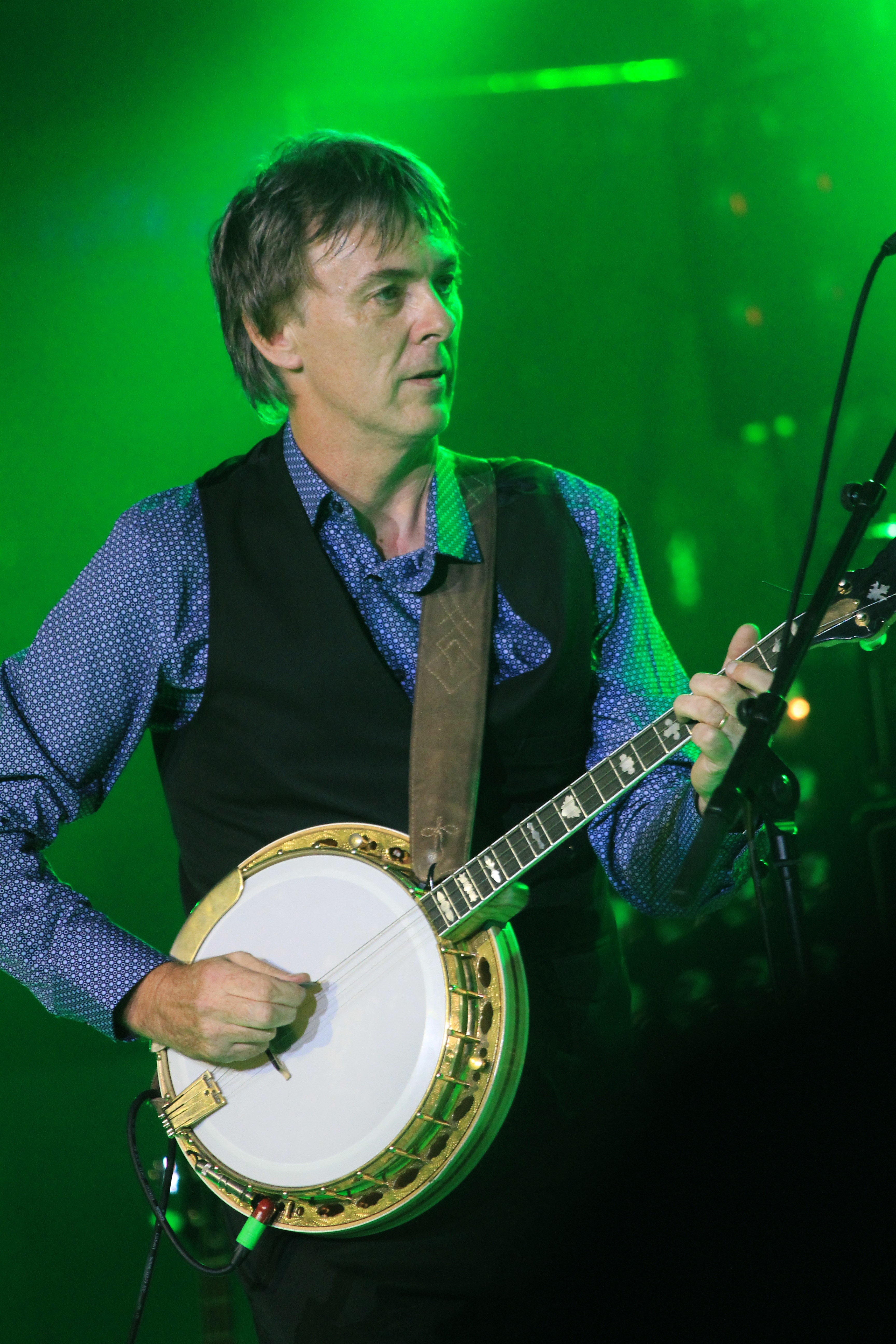 The Dublin Legends en concert au stade du moustoir lors du festival interceltique de Lorient 2014.